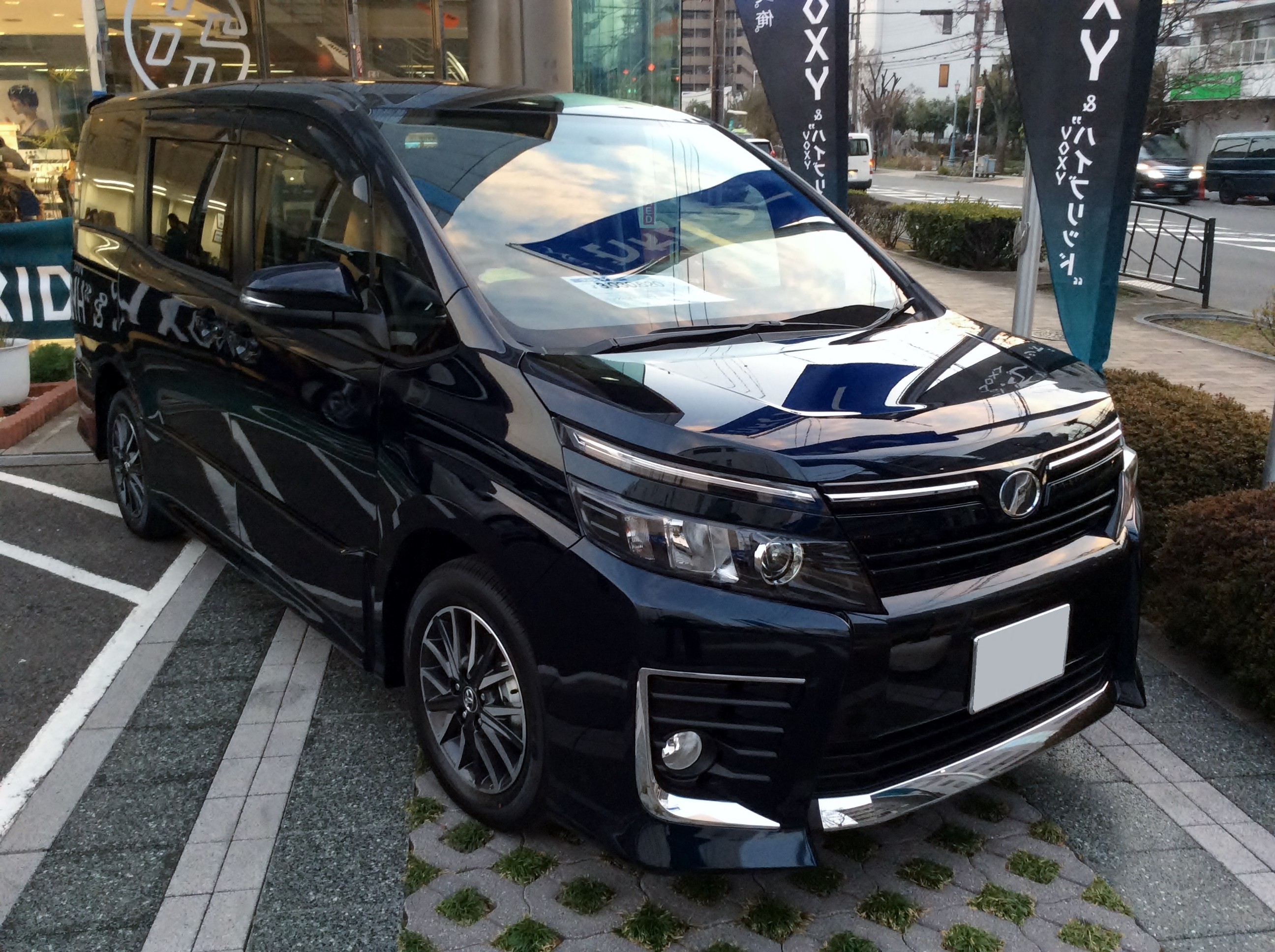 R80W型トヨタ・ヴォクシーZSをフロントから撮影。